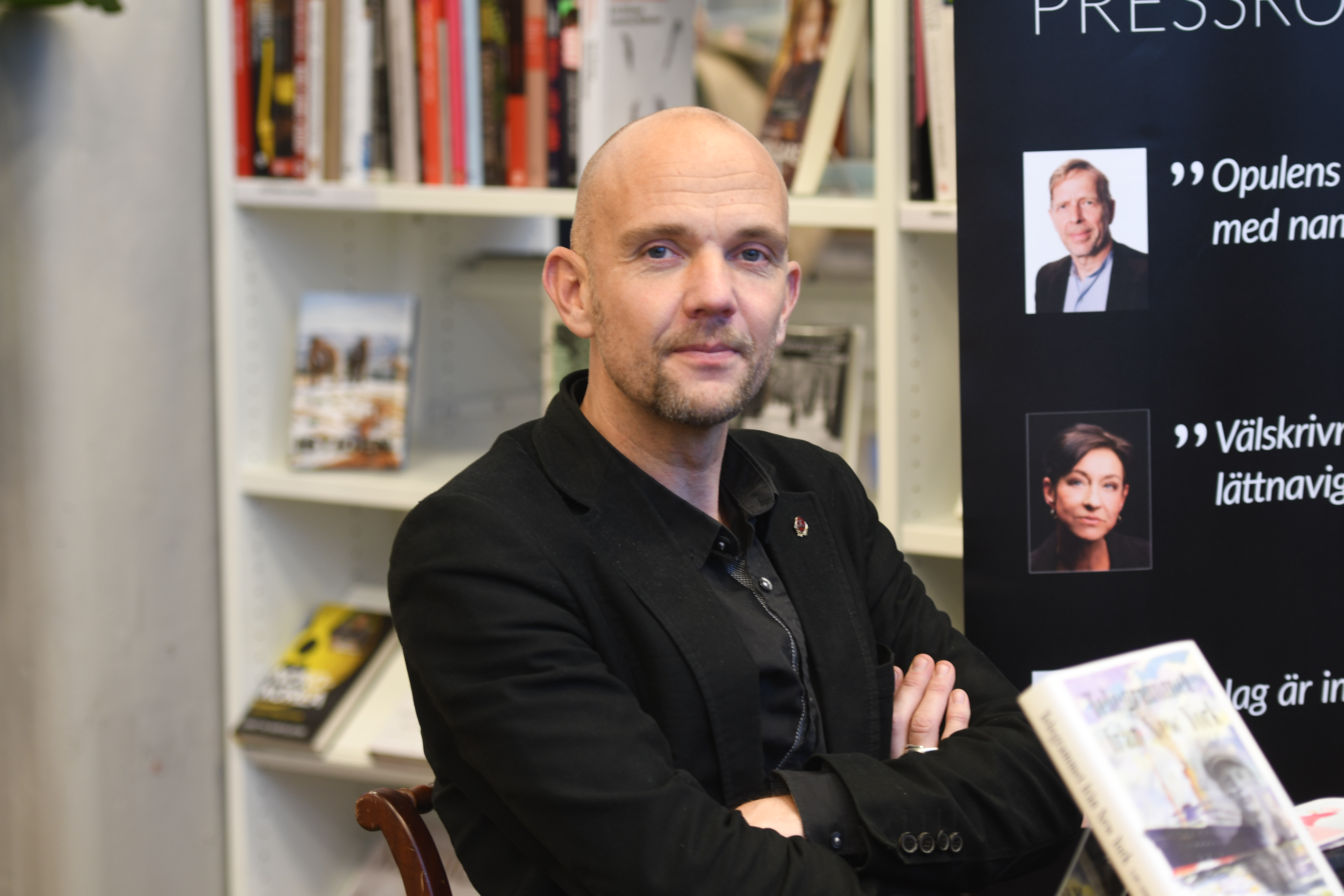 Garagets bokmässa 2018, Malmö. Stefan Bergmark vid Opulens bokbord.